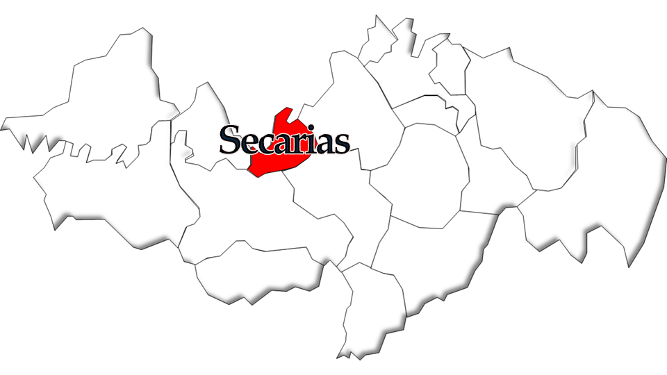 População